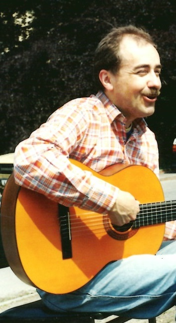 Petr Lutka (1995)